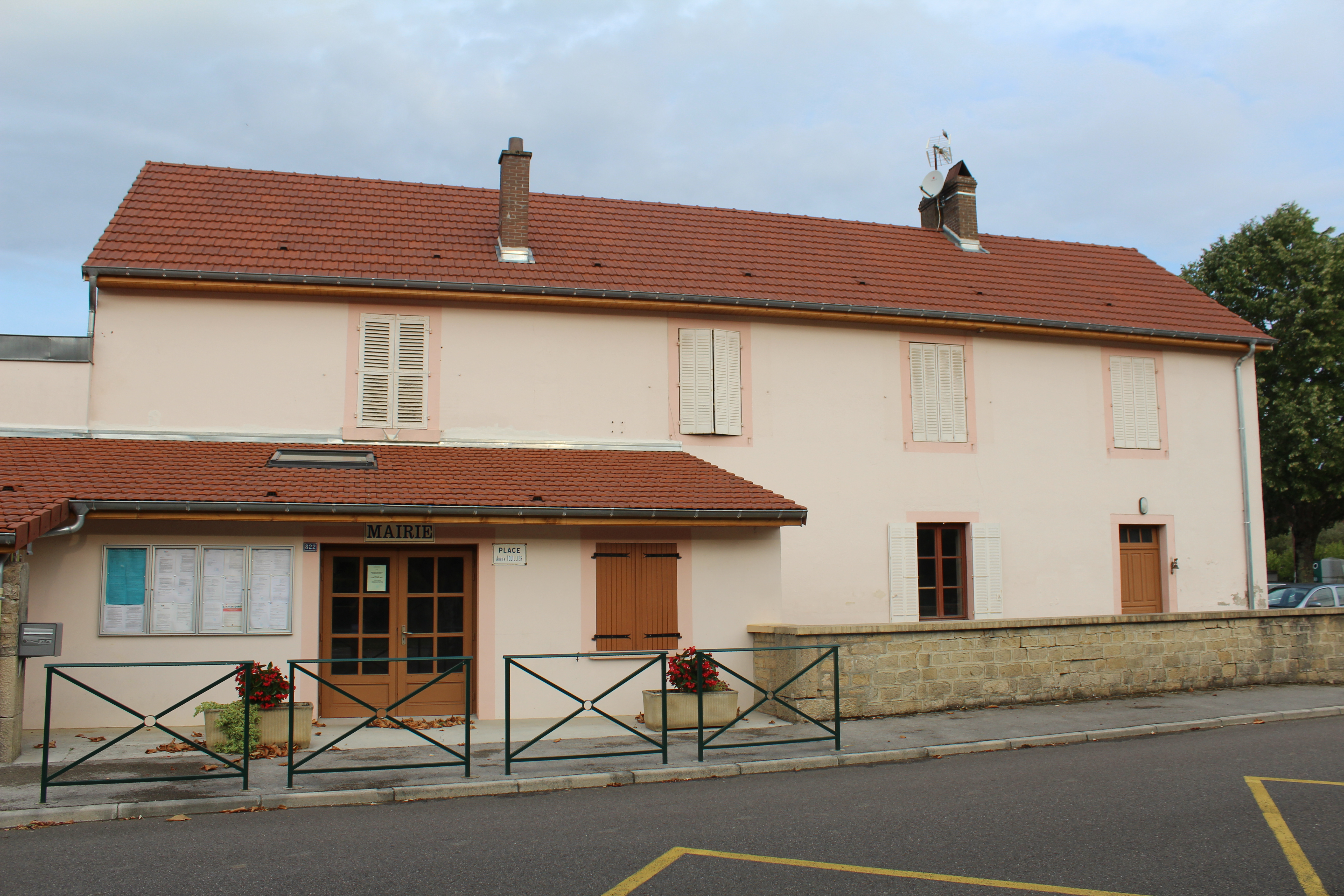 Mairie de Fontainebrux.